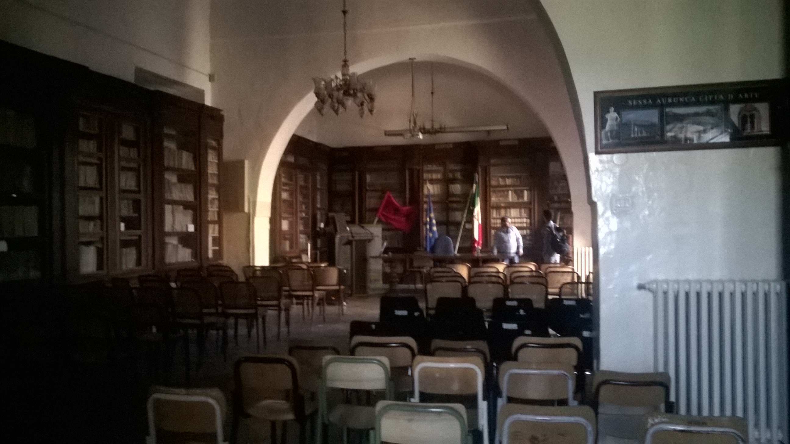 Biblioteca del Liceo classico "Agostino Nifo"